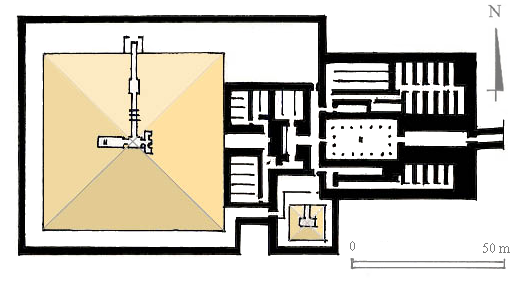 Pyramid complex of the Pyramid of Unas at Saqqara Plan den Pyramidenkomplex des Unas in Sakkara Plan du complexe funéraire d'Ouans à Saqqarah